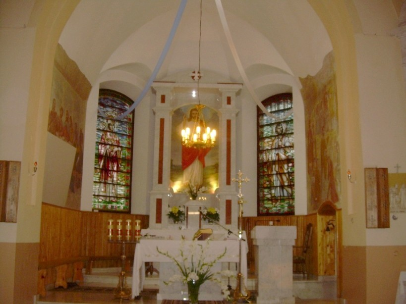 Chłopków - prezbiterium kościoła pw. Narodzenia Najświętszej Maryi Panny